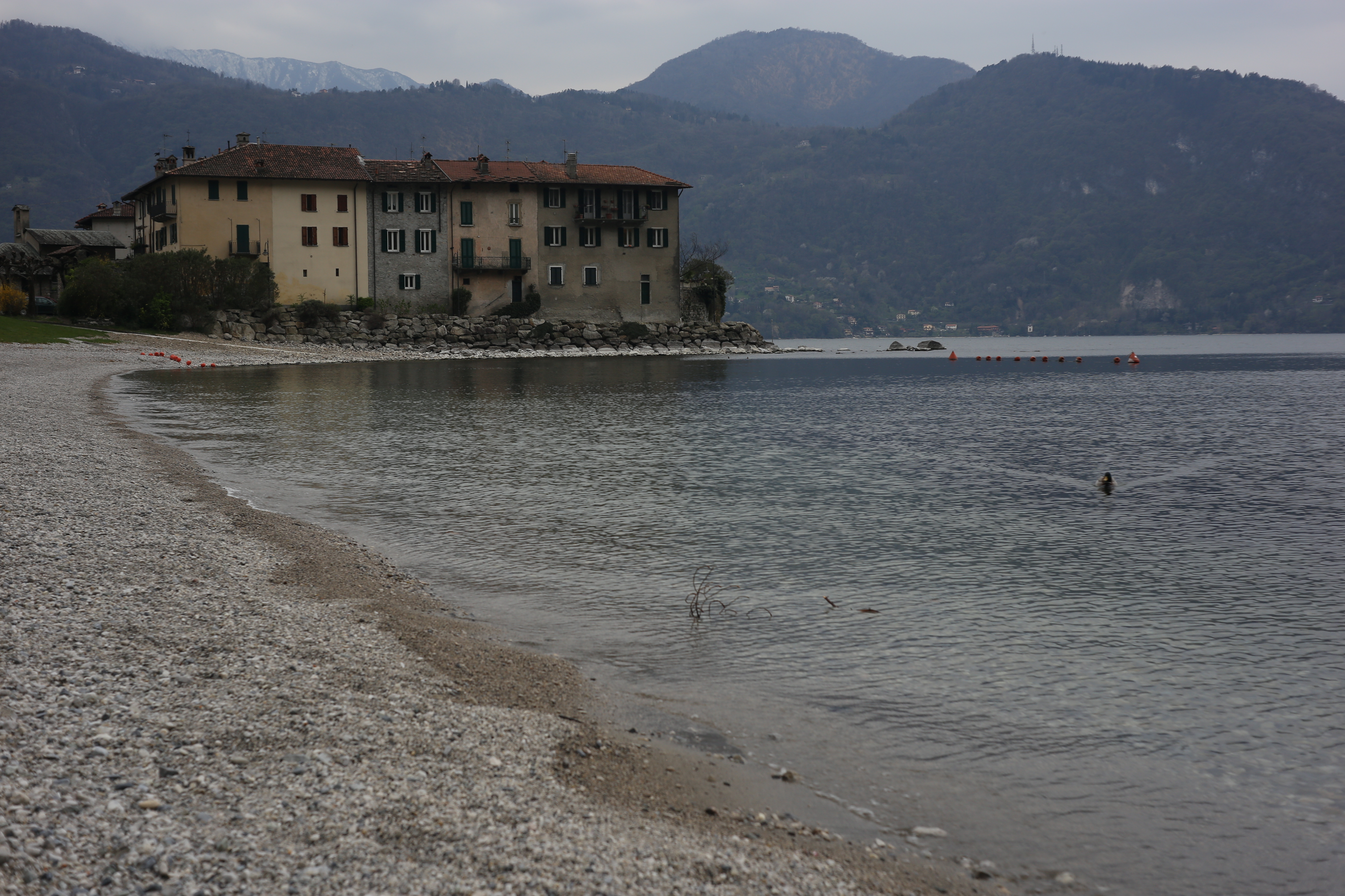 Lierna